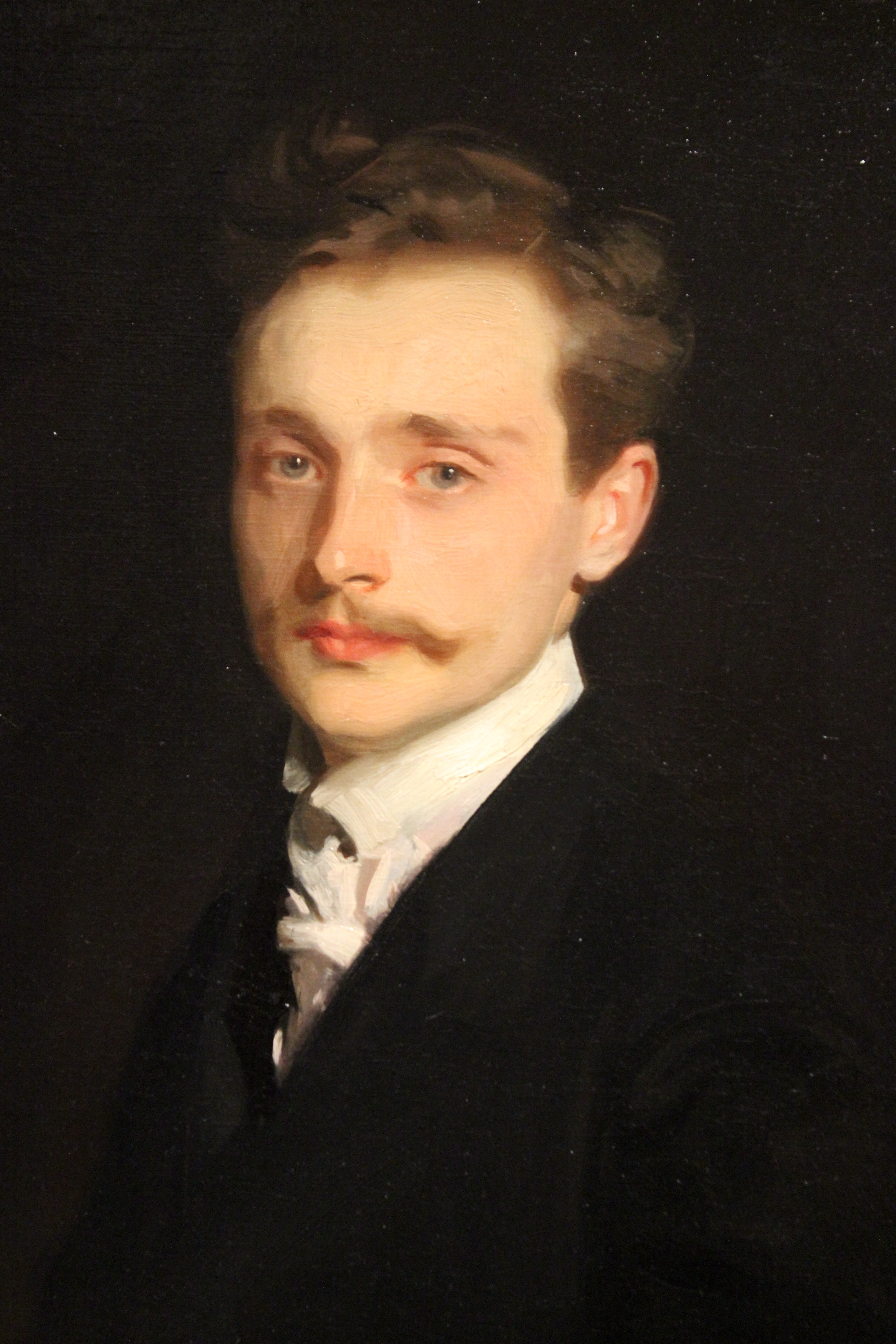 John Singer Sargent. Retrato de Léon Delafosse. Brooklyn Museum of Art. Fotografiado en el Seattle Art Museum.